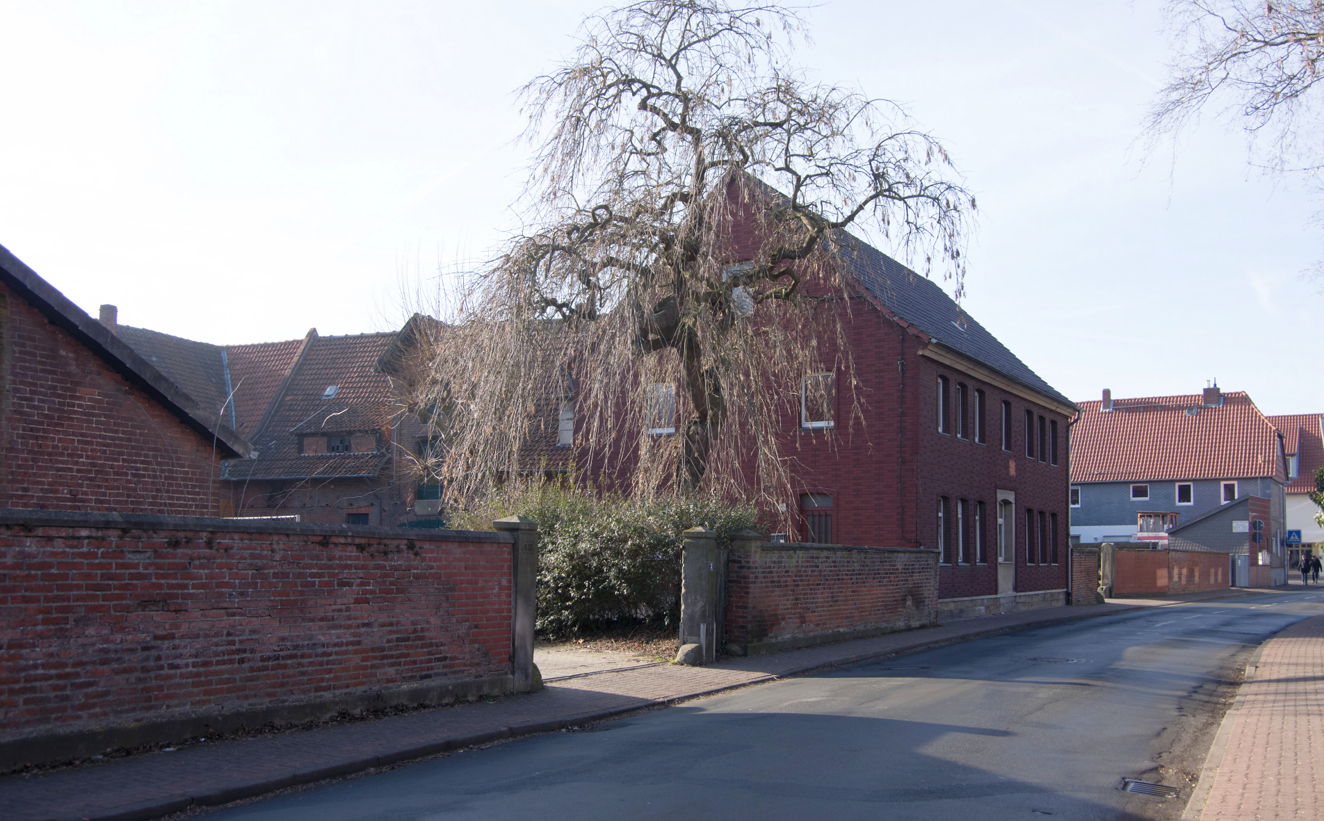 Pattensen in Niedersachsen. Der Hof Talstraße 5 wurde inzwischen abgerissen.